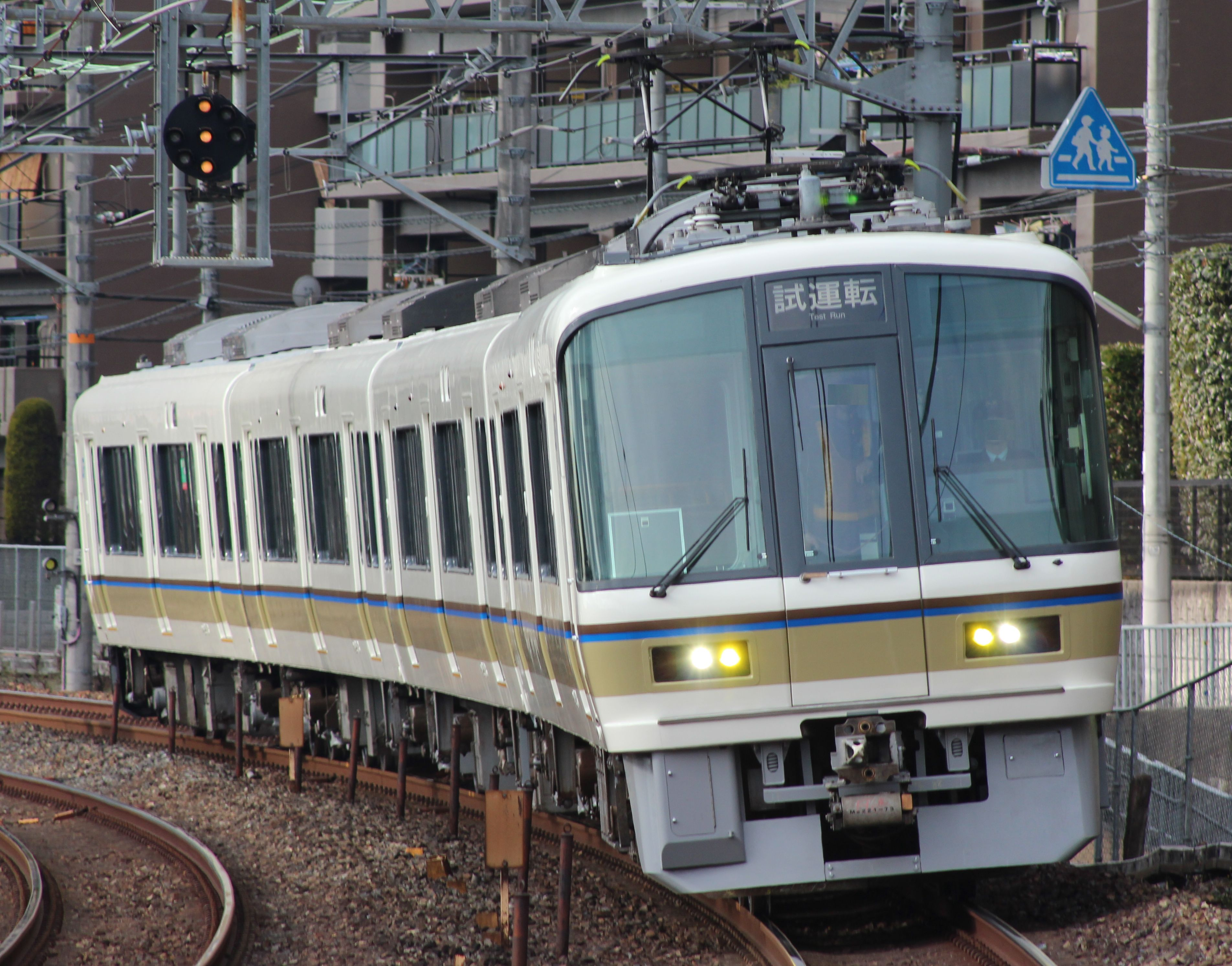 JR西日本221電車